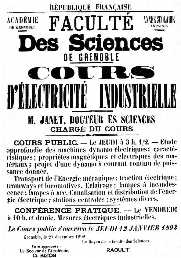 Premier cours d'électricité industrielle en 1893 à Grenoble.